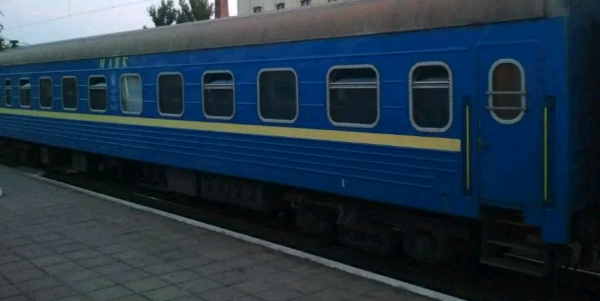 Нчний швидкий двогрупний потяг сполученням Київ — Бердянськ / Покровськ